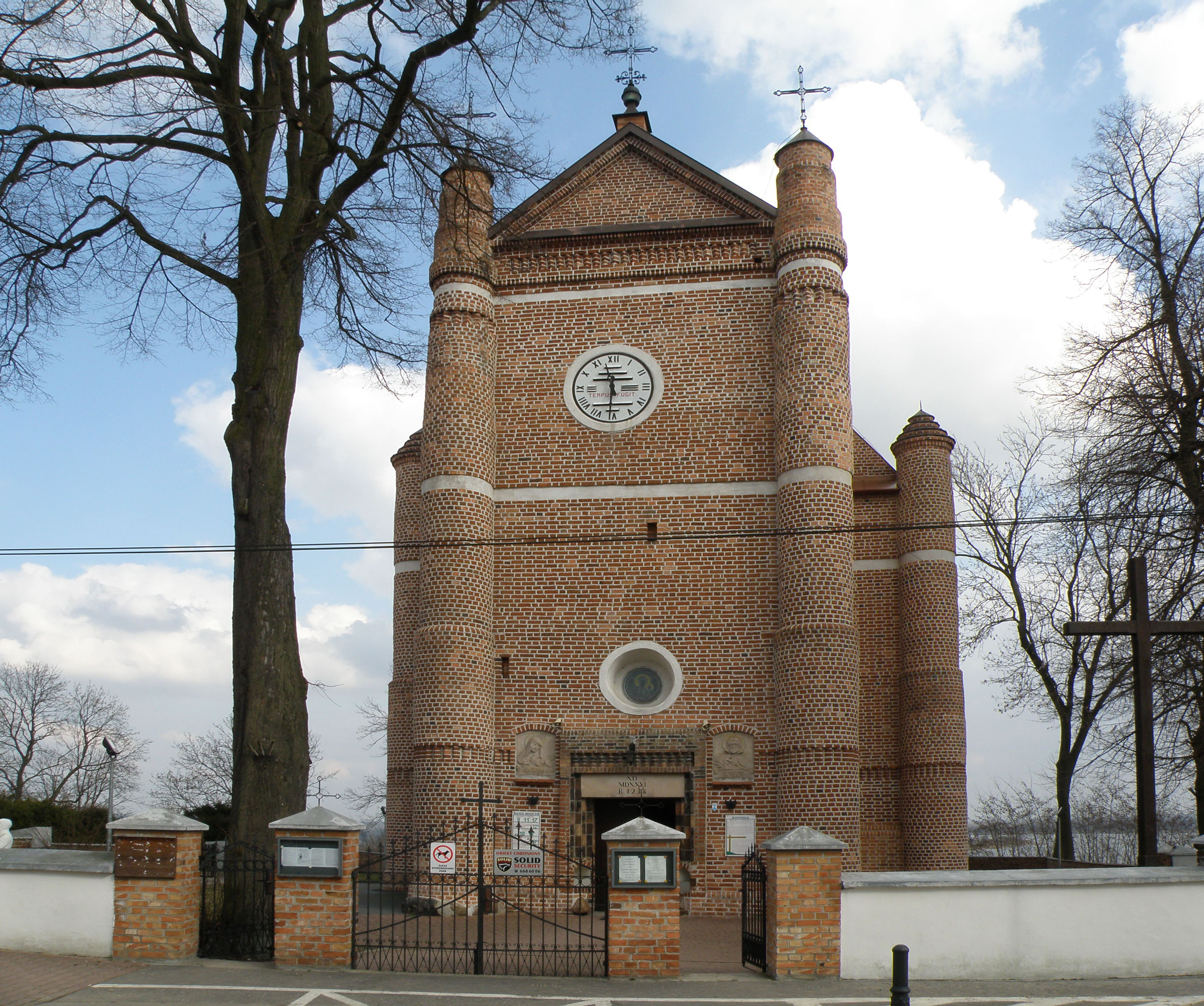 Serock, ul. Farna 7 - rzymskokatolicki kościół parafialny p.w. Zwiastowania NMP, 1512-1526, 1775-1776, 1945-1949